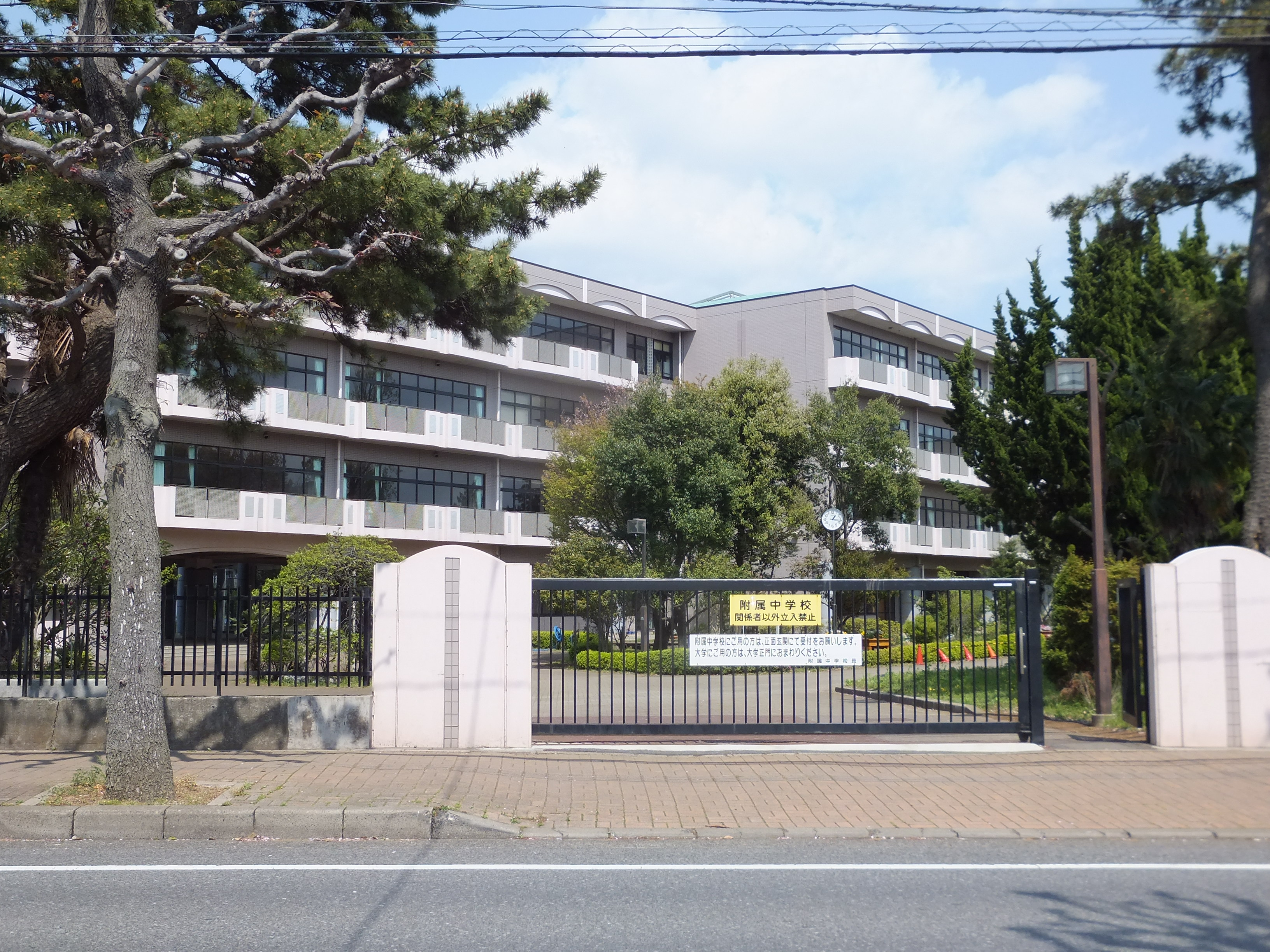 千葉大学教育学部附属中学校（千葉大学西千葉キャンパス）